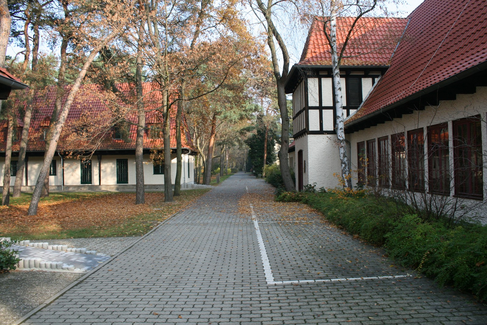 Berlin-Spandau, Stadtrandstraße 548_562.